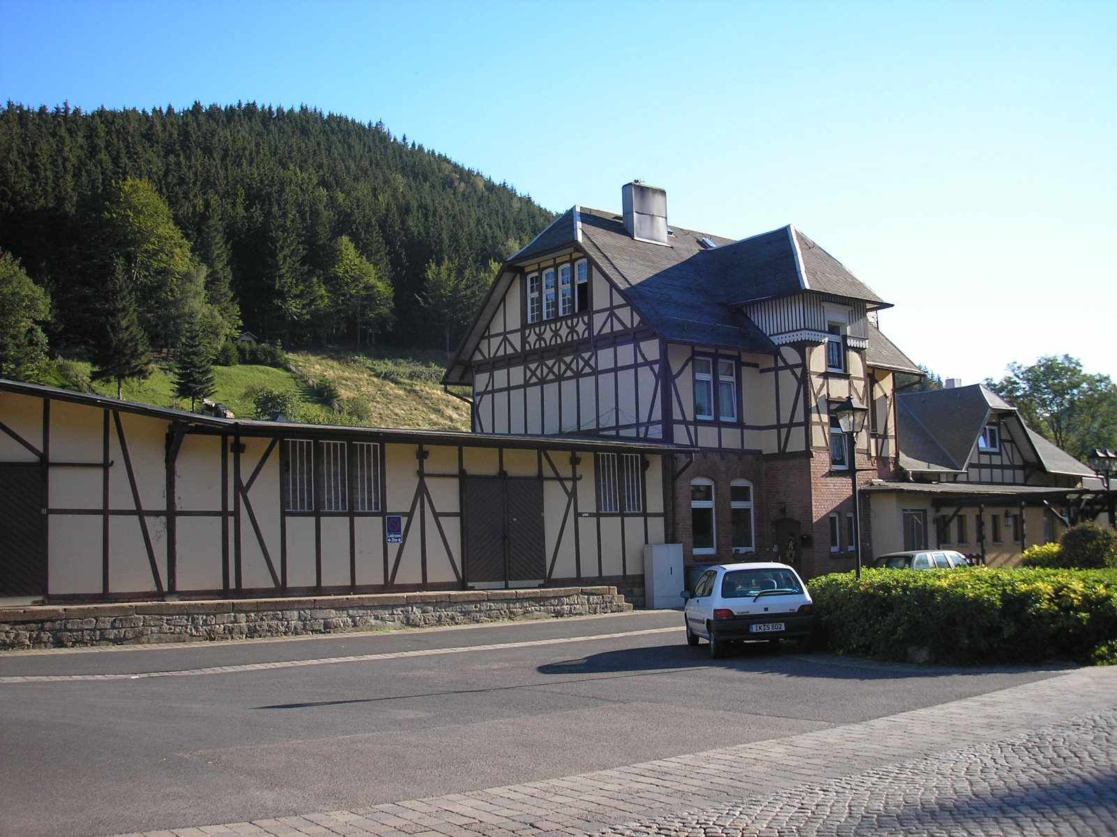 Bahnhof von Manebach (Thüringen).